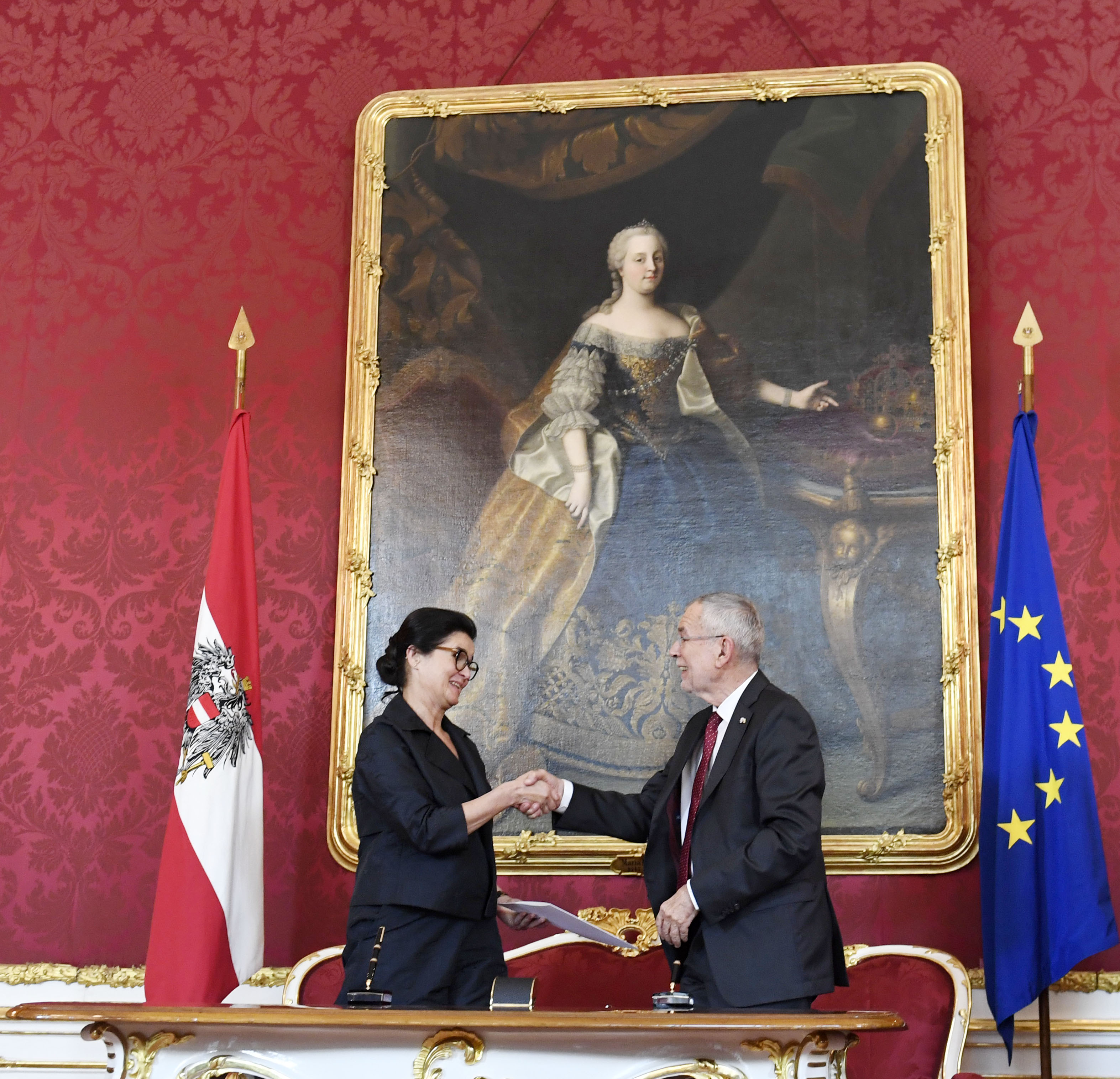 Am 3. Juni 2019 wurde Mag. Alexander Schallenberg als Bundesminister für Europa, Integration und Äußeres angelobt. Foto: Mahmoud